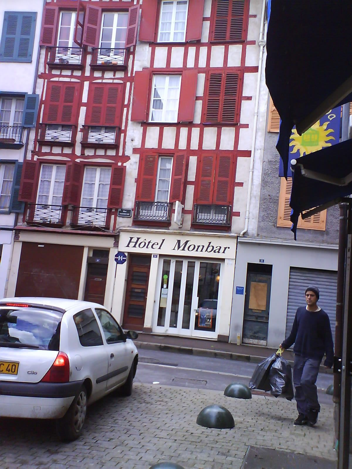 Hotel Monbar de Bayona en 2007